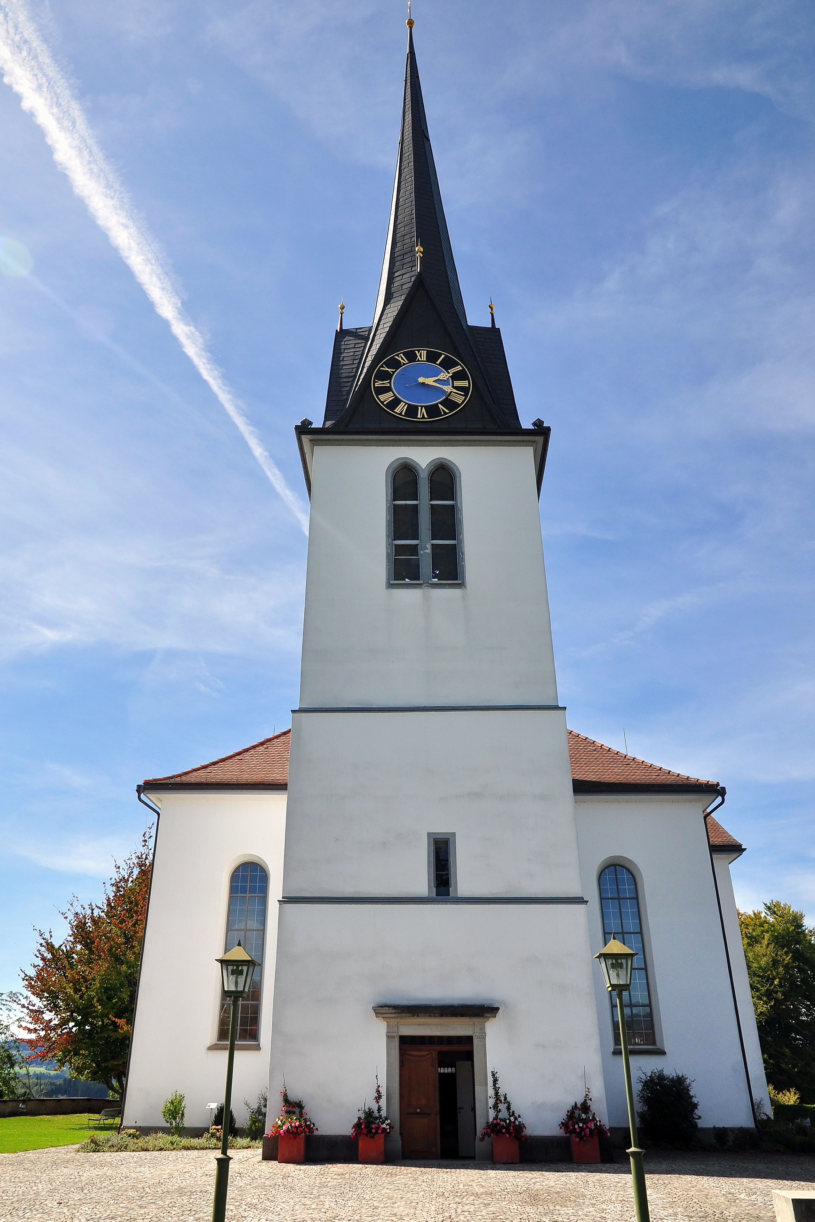 Reformierte Kirche, Bergstrasse in Gossau (Switzerland)